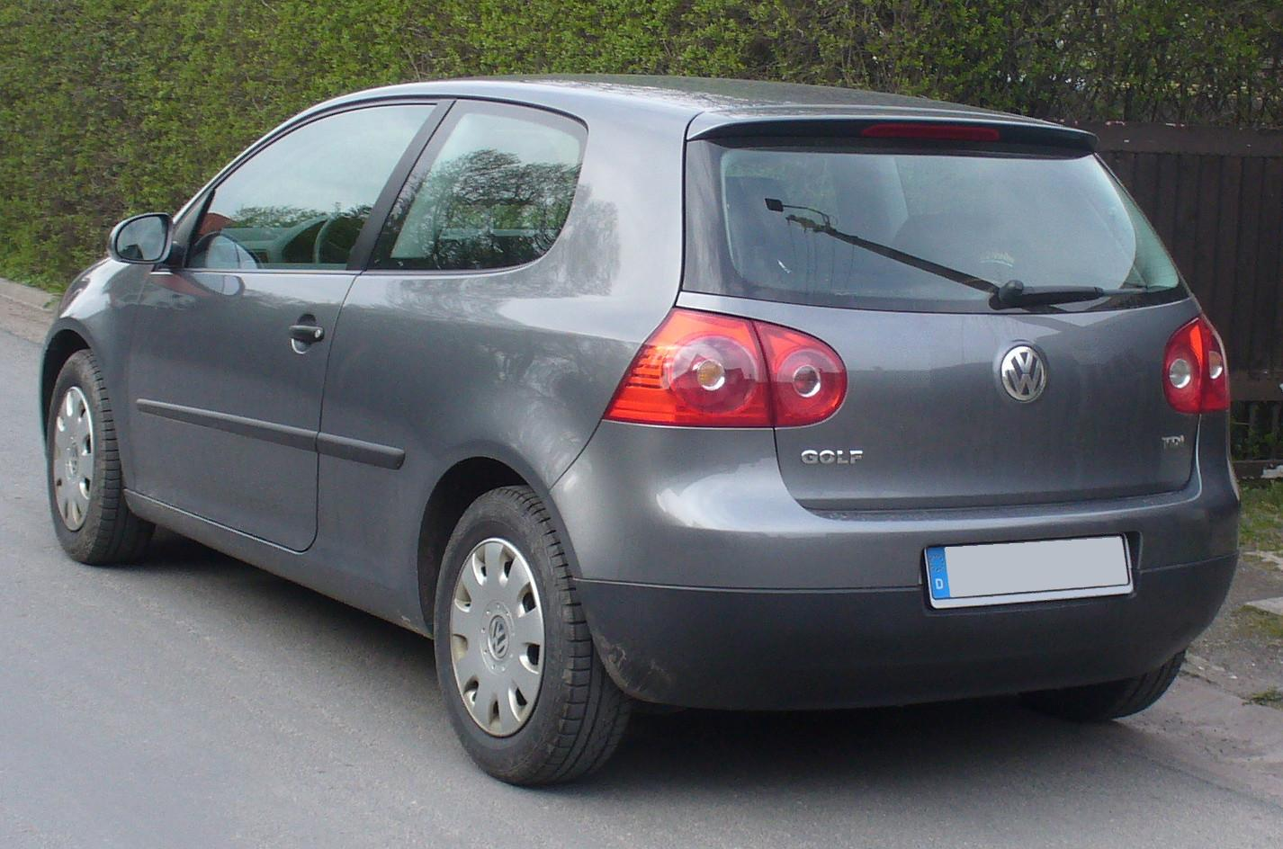 VW Golf V